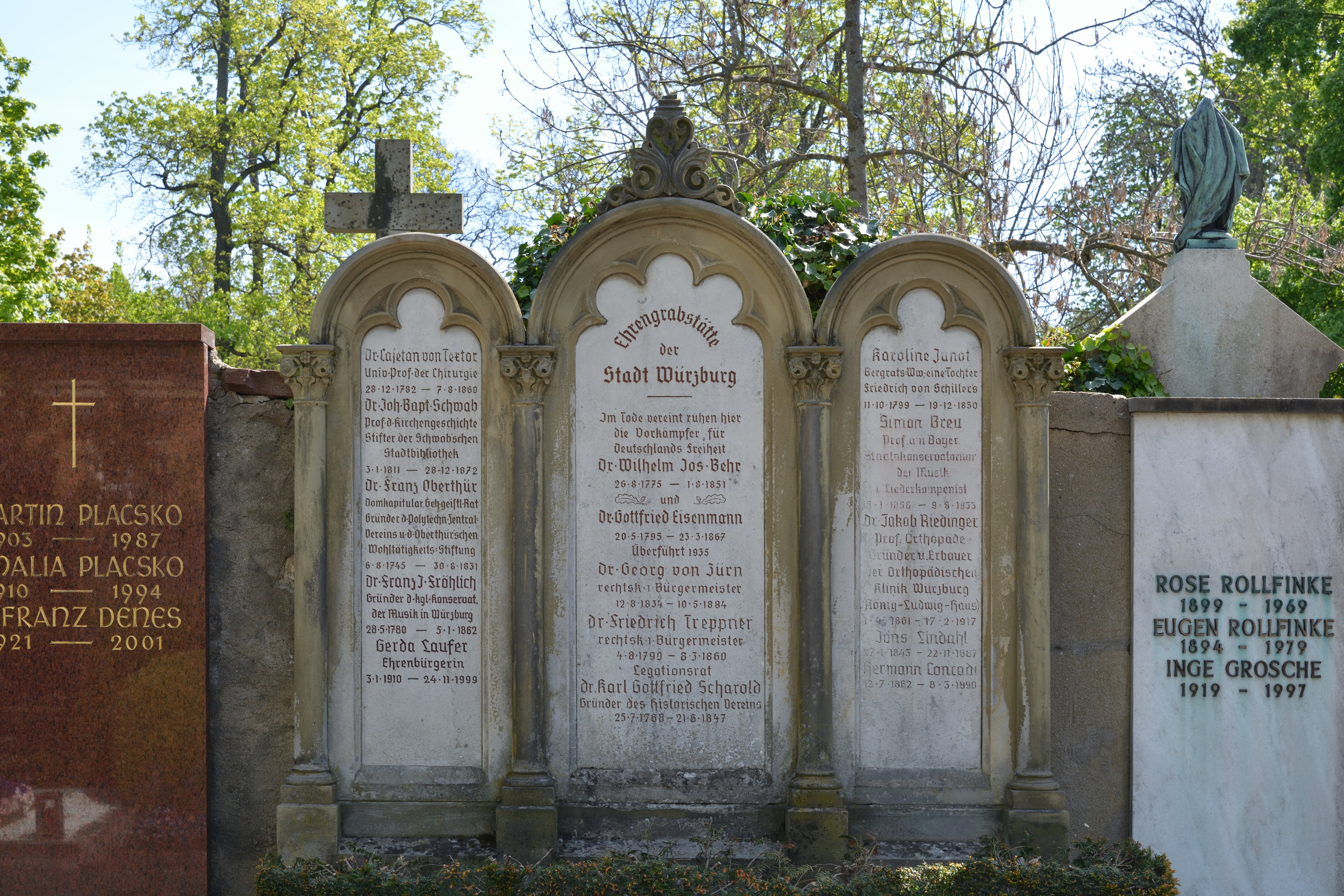 Impressionen vom Hauptfriedhof Würzburg Ehrengrab der Stadt Würzburg: Cajetan von Textor Johann Baptist Schwab Franz Oberthür Franz Joseph Fröhlich Gerda Laufer Wilhelm Joseph Behr Gottfried Eisenmann Georg von Zürn Josef Friedrich Treppner Carl Gottfried Scharold Caroline Junot Simon Breu Jakob Riedinger Jöns Lindahl Hermann Conradi